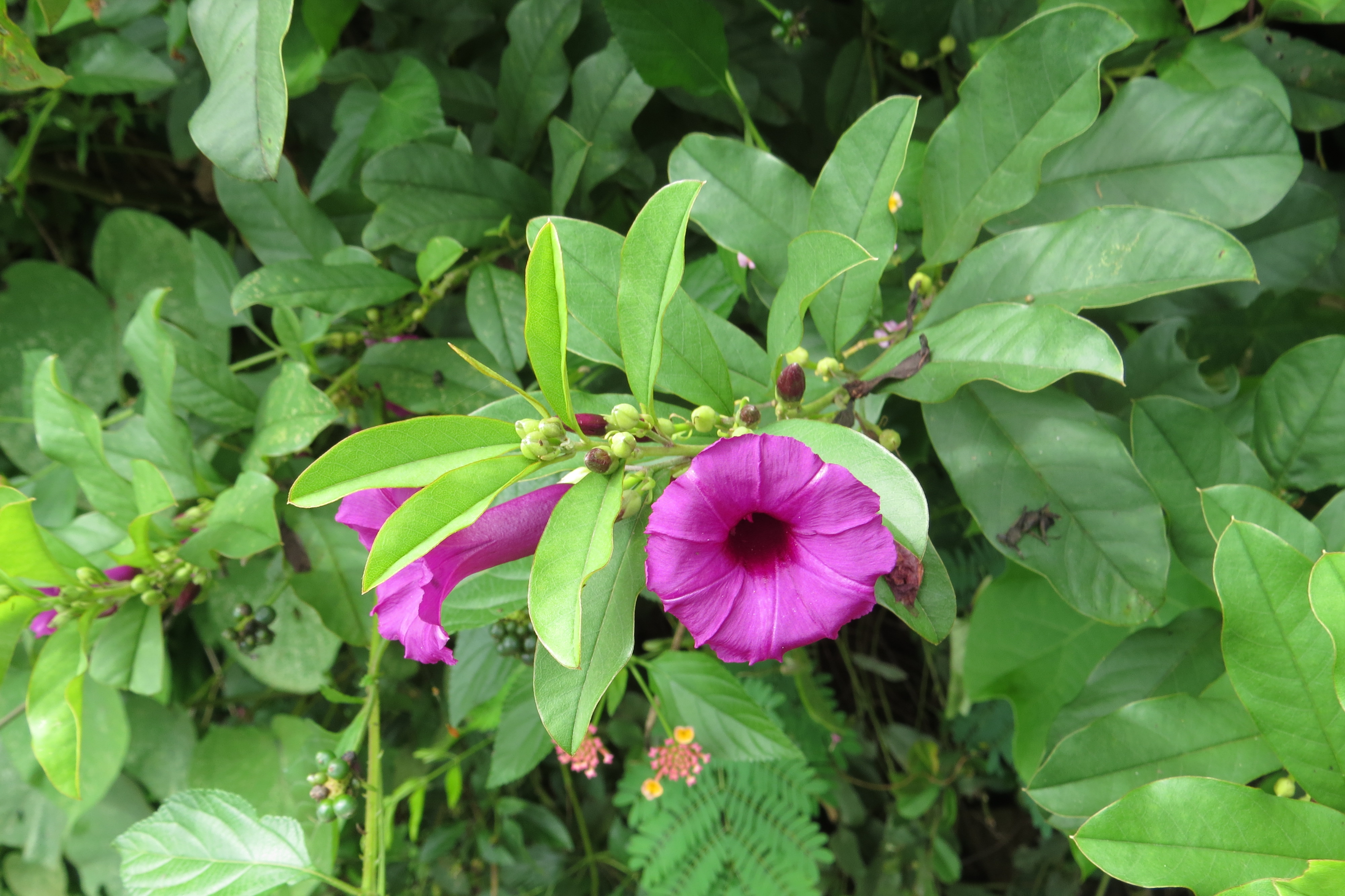 Photos by Vinayaraj